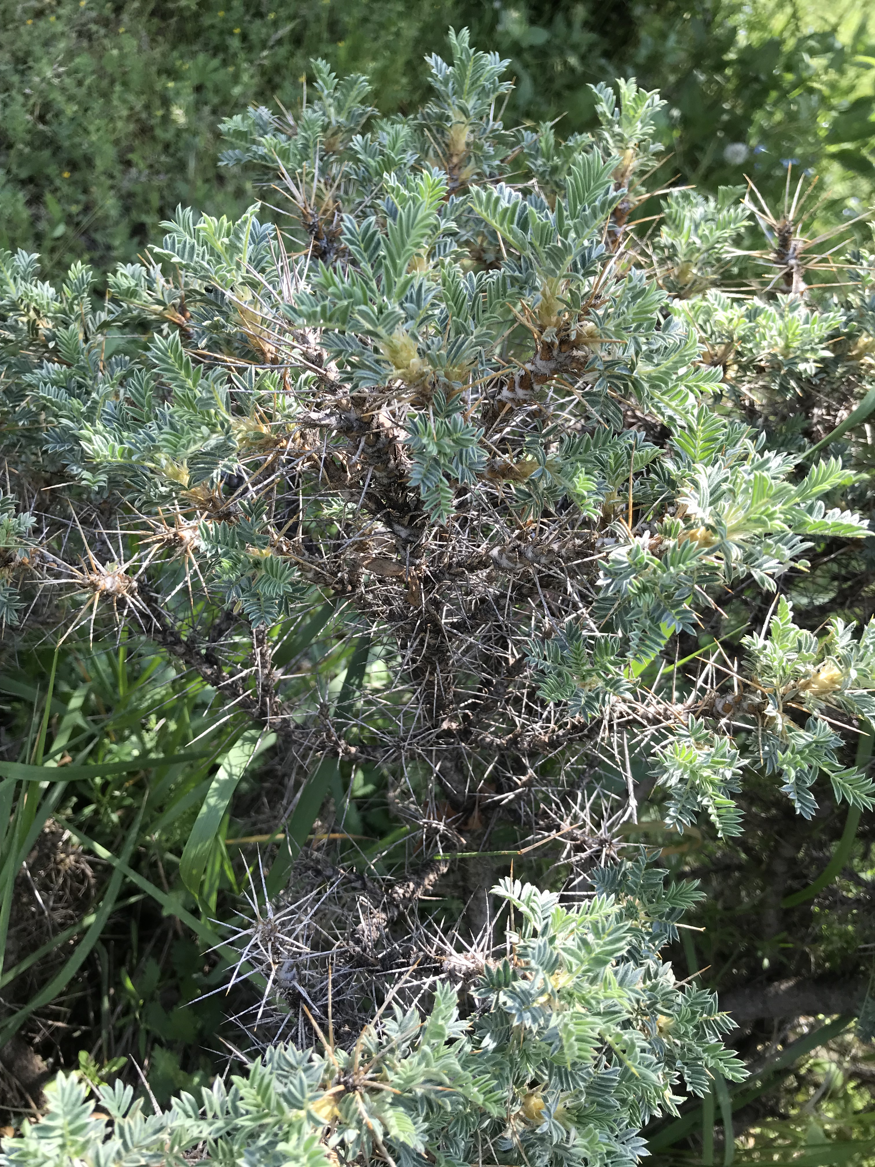 Խոսրով